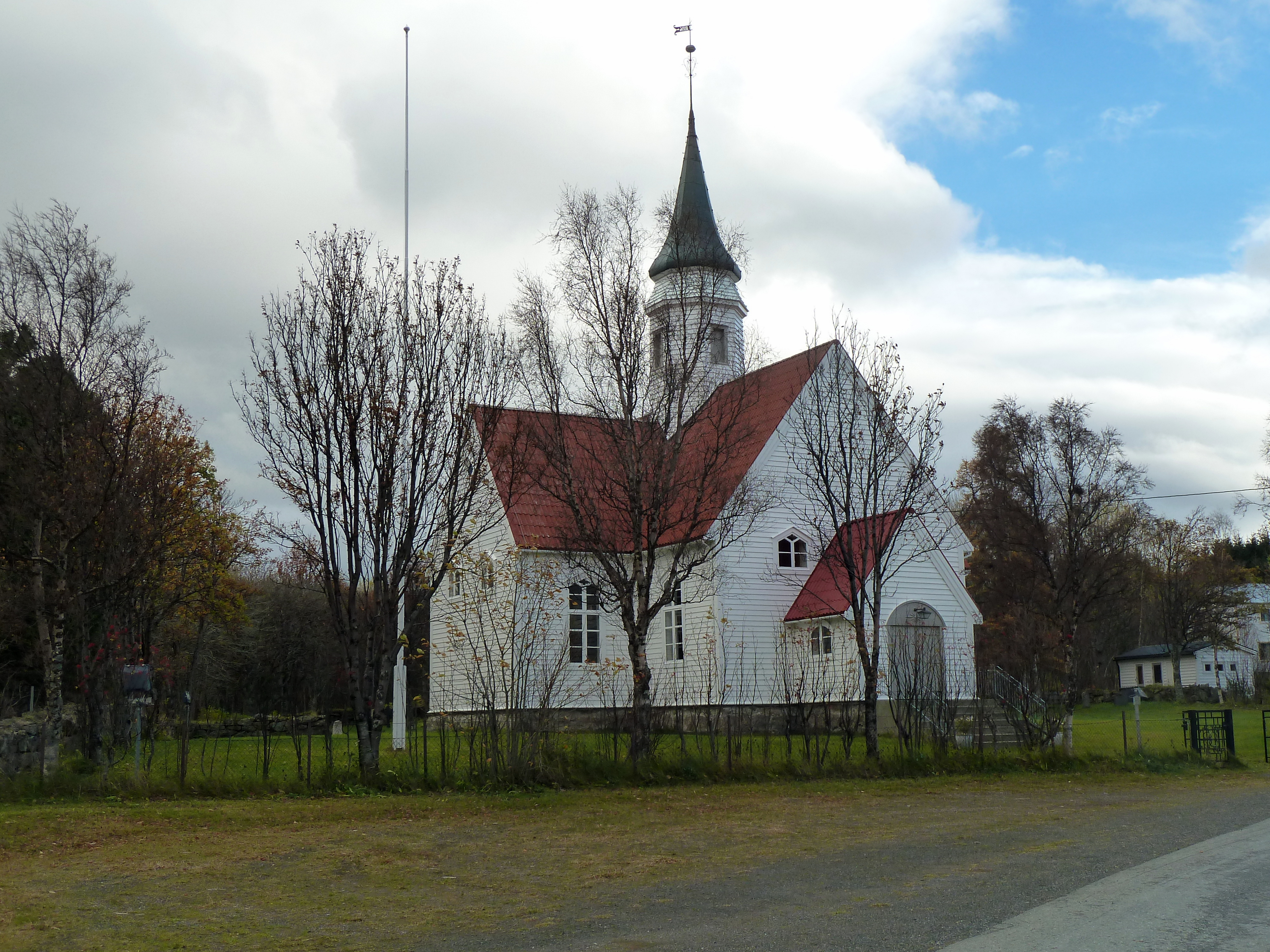 Bjarkøy kirke på Bjarkøya i Troms.